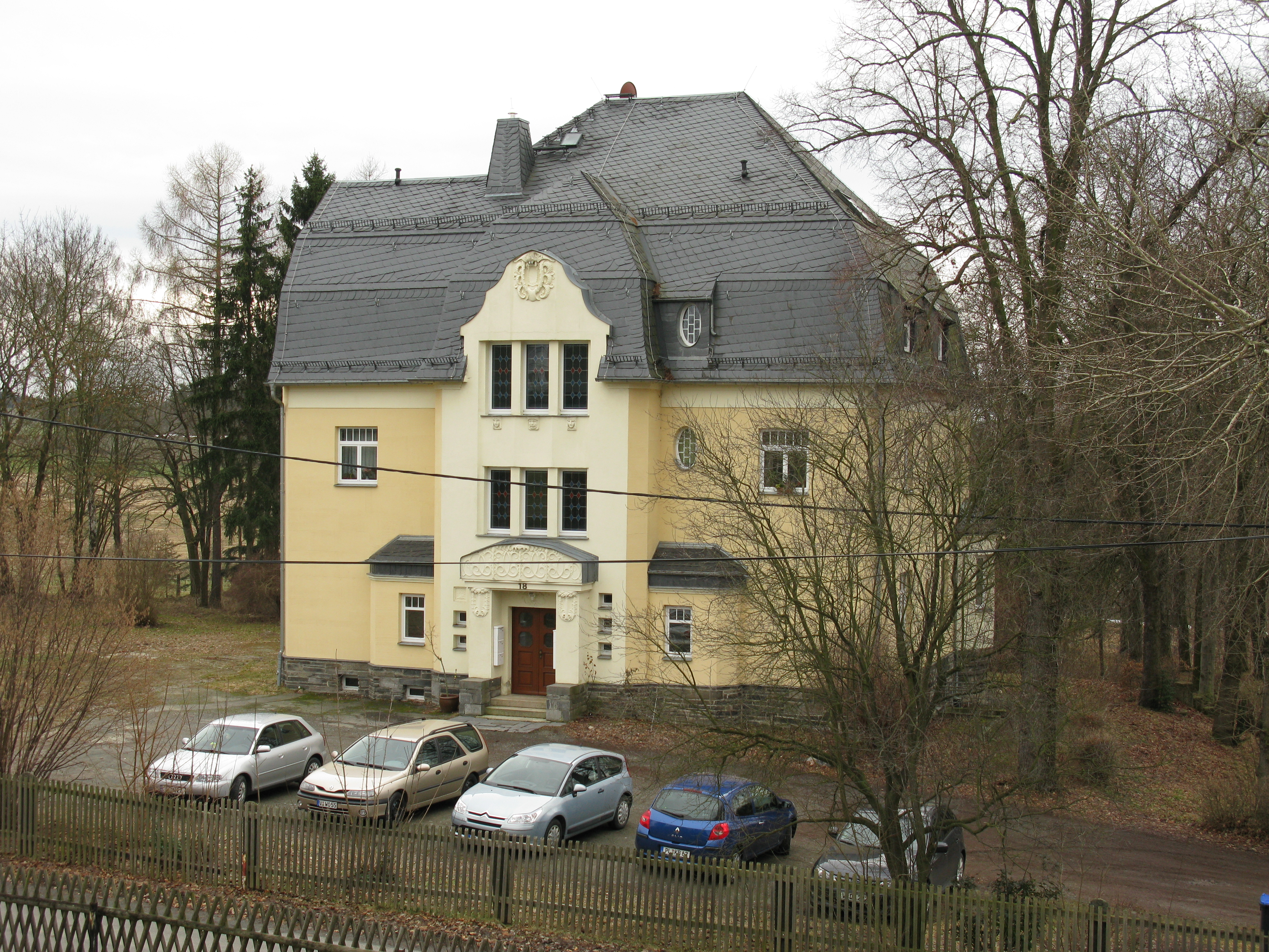 Denkmalgeschützte Villa im Plauener Stadtteil Großfiresen (Theumaer Weg 18)